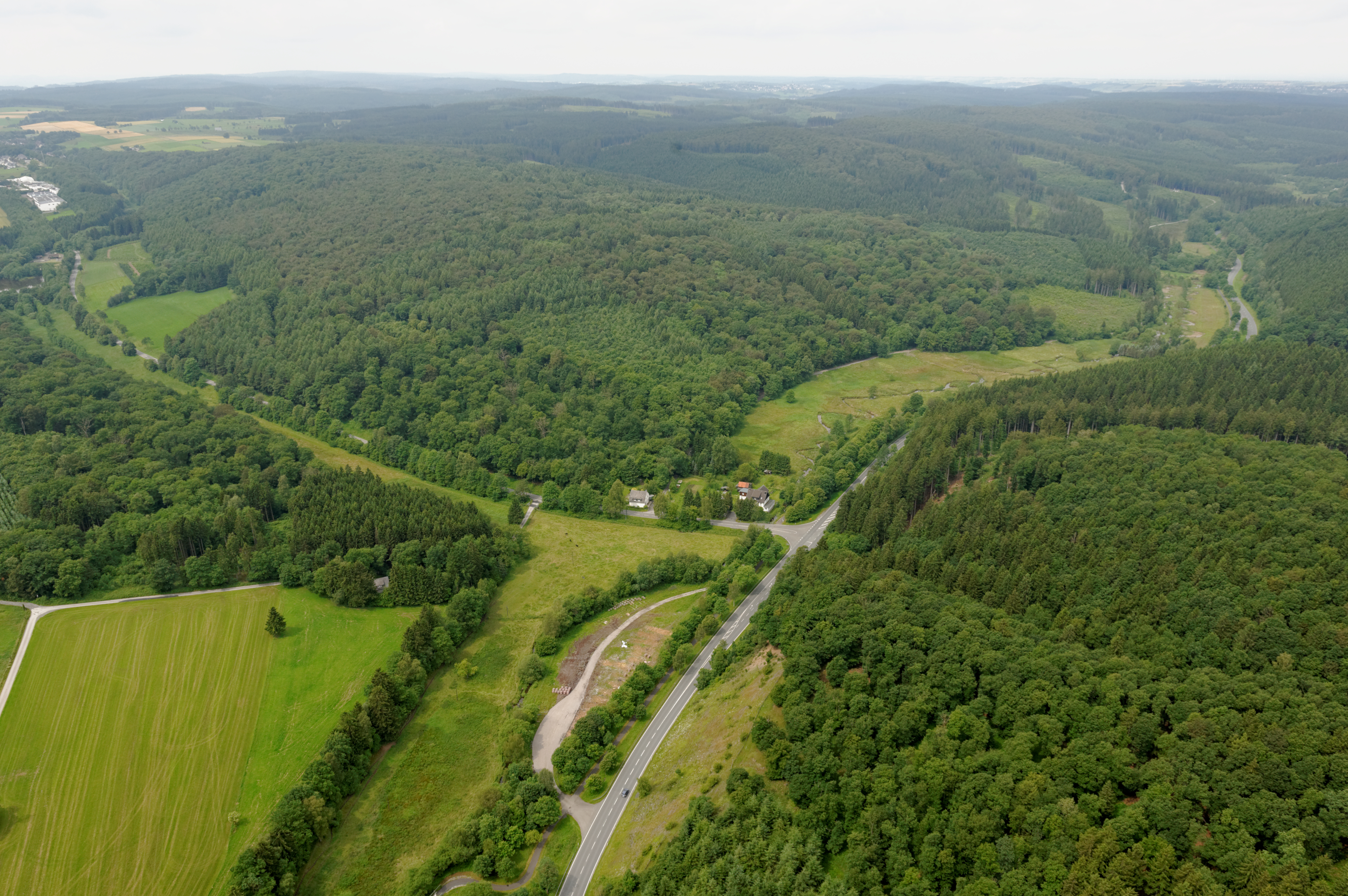 Fotoflug Sauerland Nord. Möhnetal beim ehemaligen Scharfenberger Bahnhof (Teil des Naturschutzgebietes Oberes Möhnetal (HSK-482)), links Bermecketal und oben Naturschutzgebiet Wünnenbecke. The making of this document was supported by the Community-Budget of Wikimedia Germany.